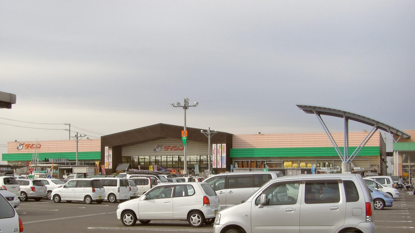 ダイシン亘理店